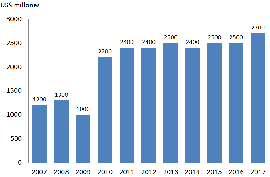 Tendencia de la riqueza de Sebastián Piñera desde el año 2007, según la revista Forbes.